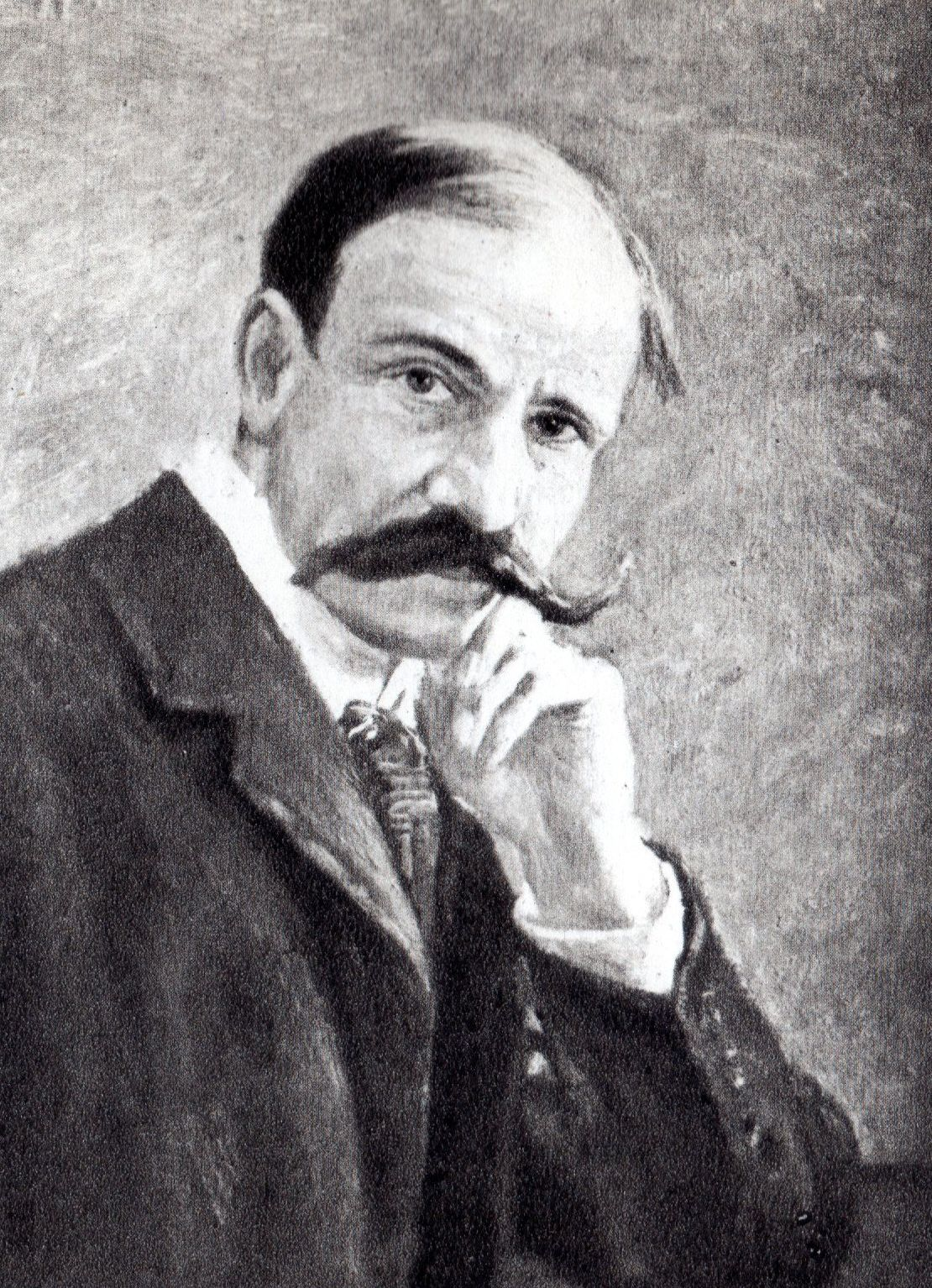 Maurycy Pius Rudzki, astronom i geofizyk